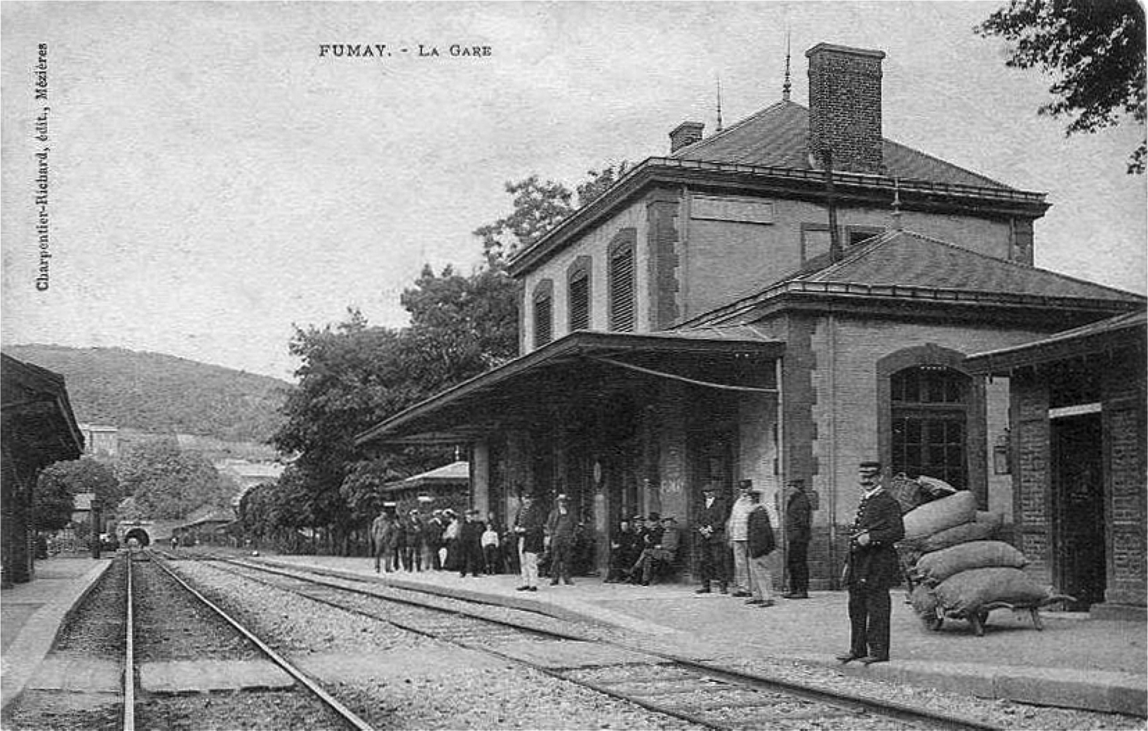 L'intérieur de la gare de Fumay au début des années 1900.